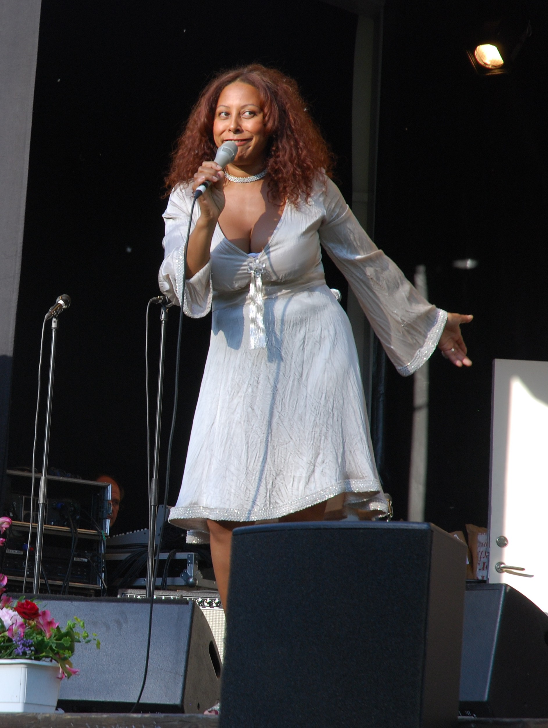 Jazz singer Elisabeth Kontomanou at Huddinge Jazz Festival 2010, Huddinge, Sweden